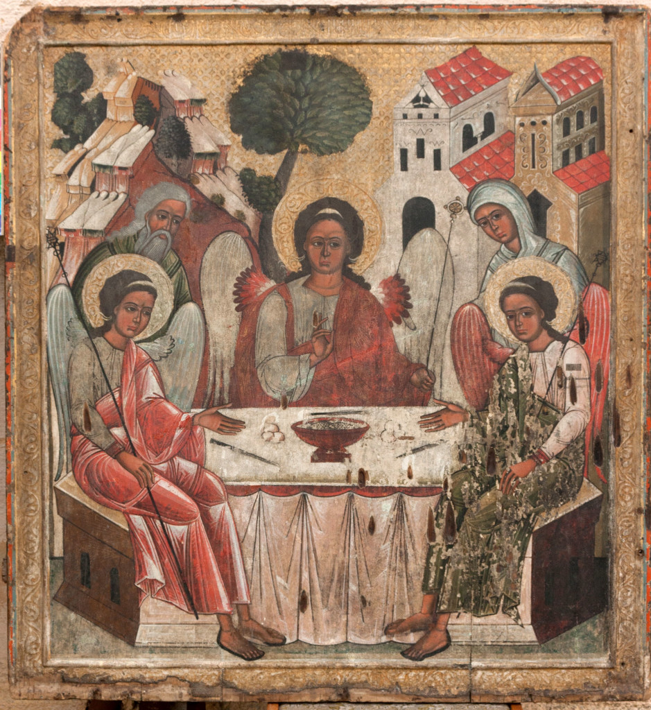 “Трійця Старозавітна” Федуско маляр з Самбора 2 пол 16 із ц. Трійці, м. Дрогобич